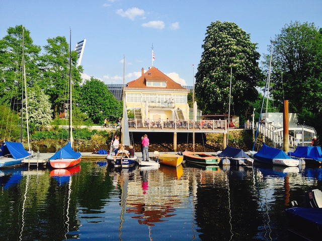 Clubhaus des Segelvereins »Weser« vor dem Weserstadion